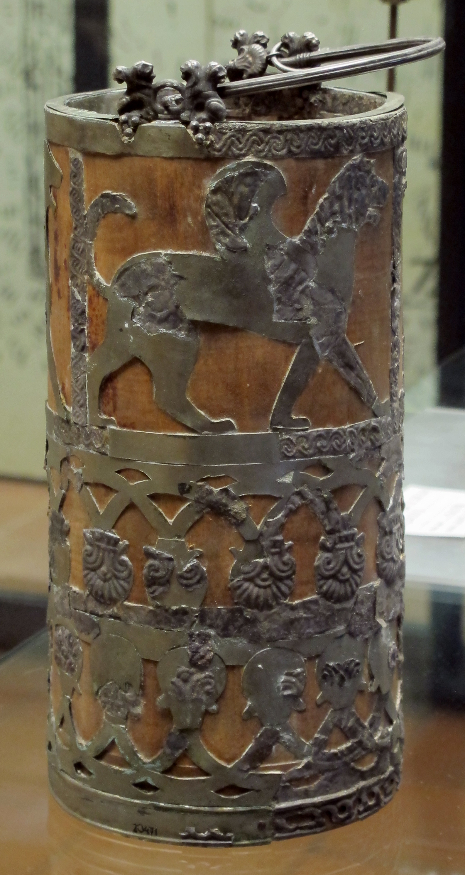 Museo Gregoriano Etrusco